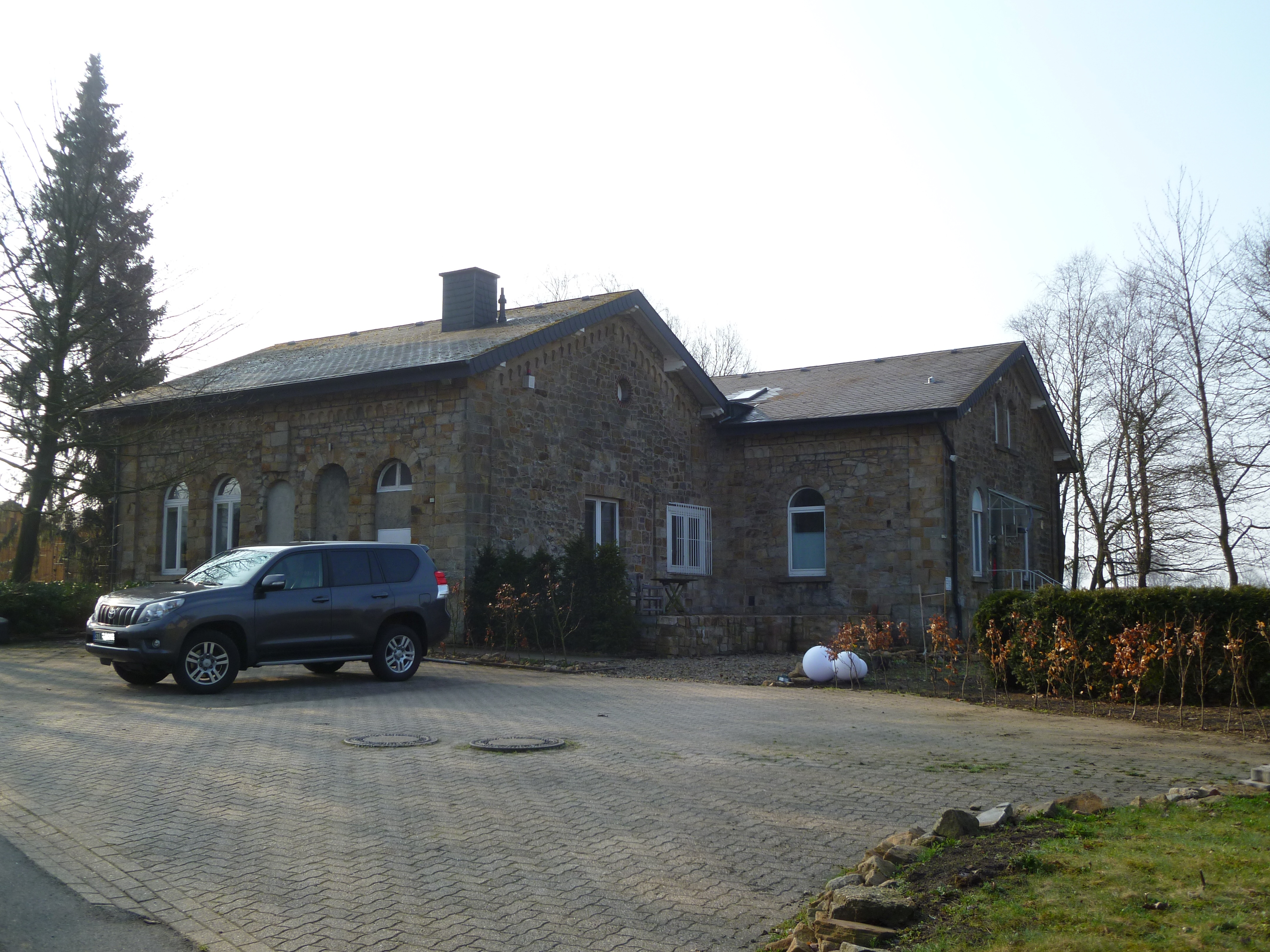 Gebäude des Seilschachtes in Ibbenbüren